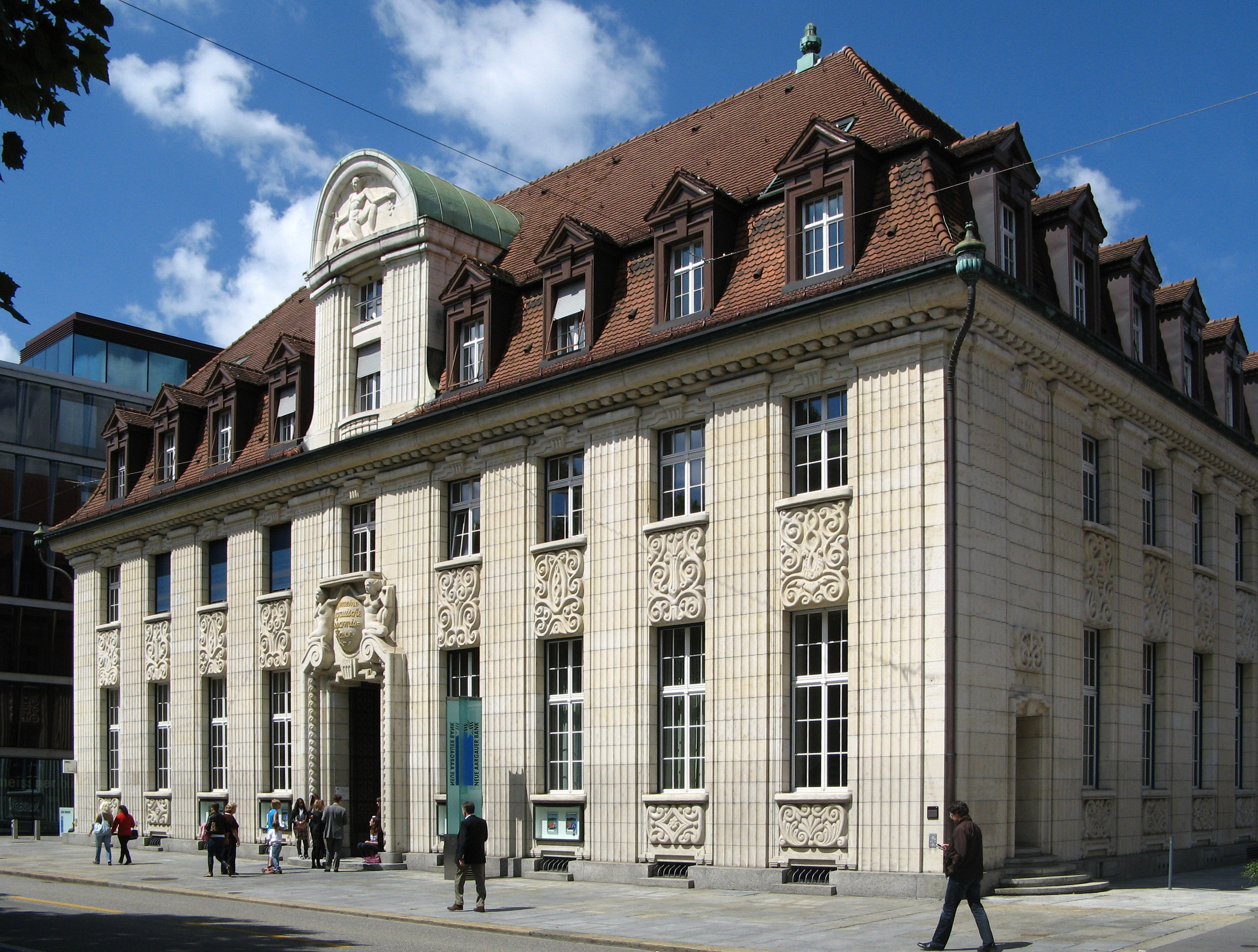 Gebäude der Neuen Aargauer Bank in Aarau